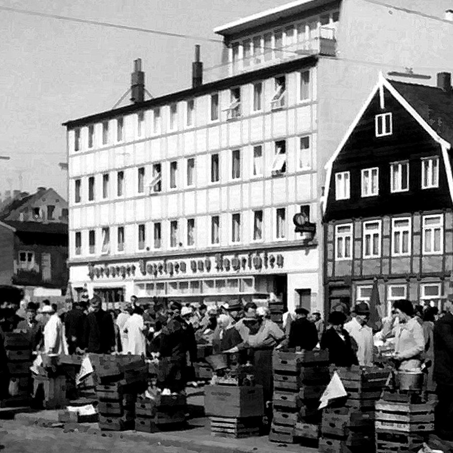 Verlagsgebäude Harburger Anzeigen und Nachrichten - um 1950